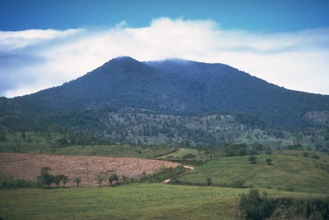 Tenorio volcanic complex in Costa Rica